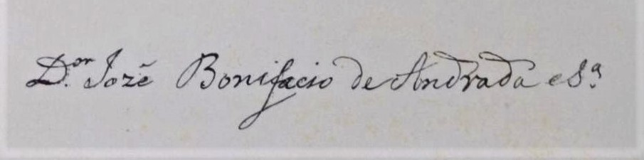 Assinatura de José Bonifácio de Andrada e Silva.